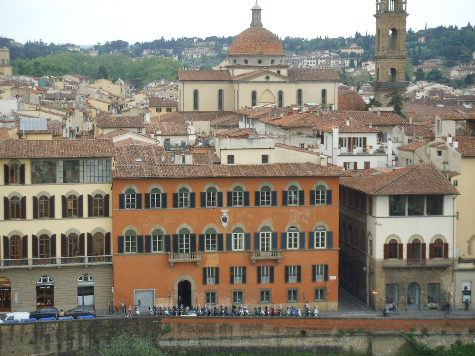 Torre dei gianfigliazzi, veduta, palazzo capponi vettori e santo spirito